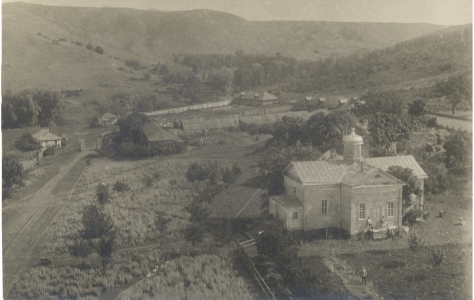 Российская империя. Бузулук. Спасо-Преображенский монастырь.